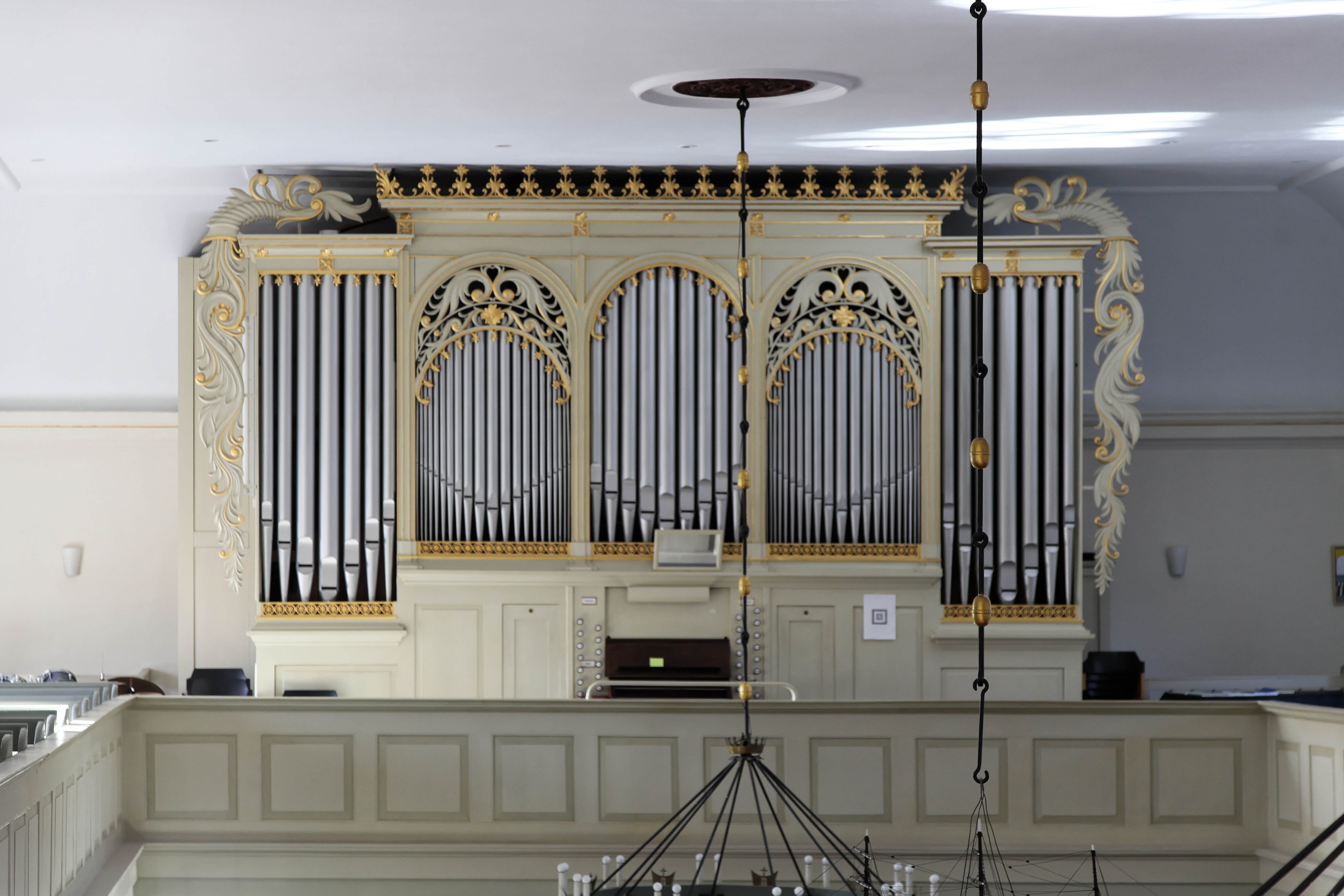 Hoffnungskirche, Untenende in Rhauderfehn